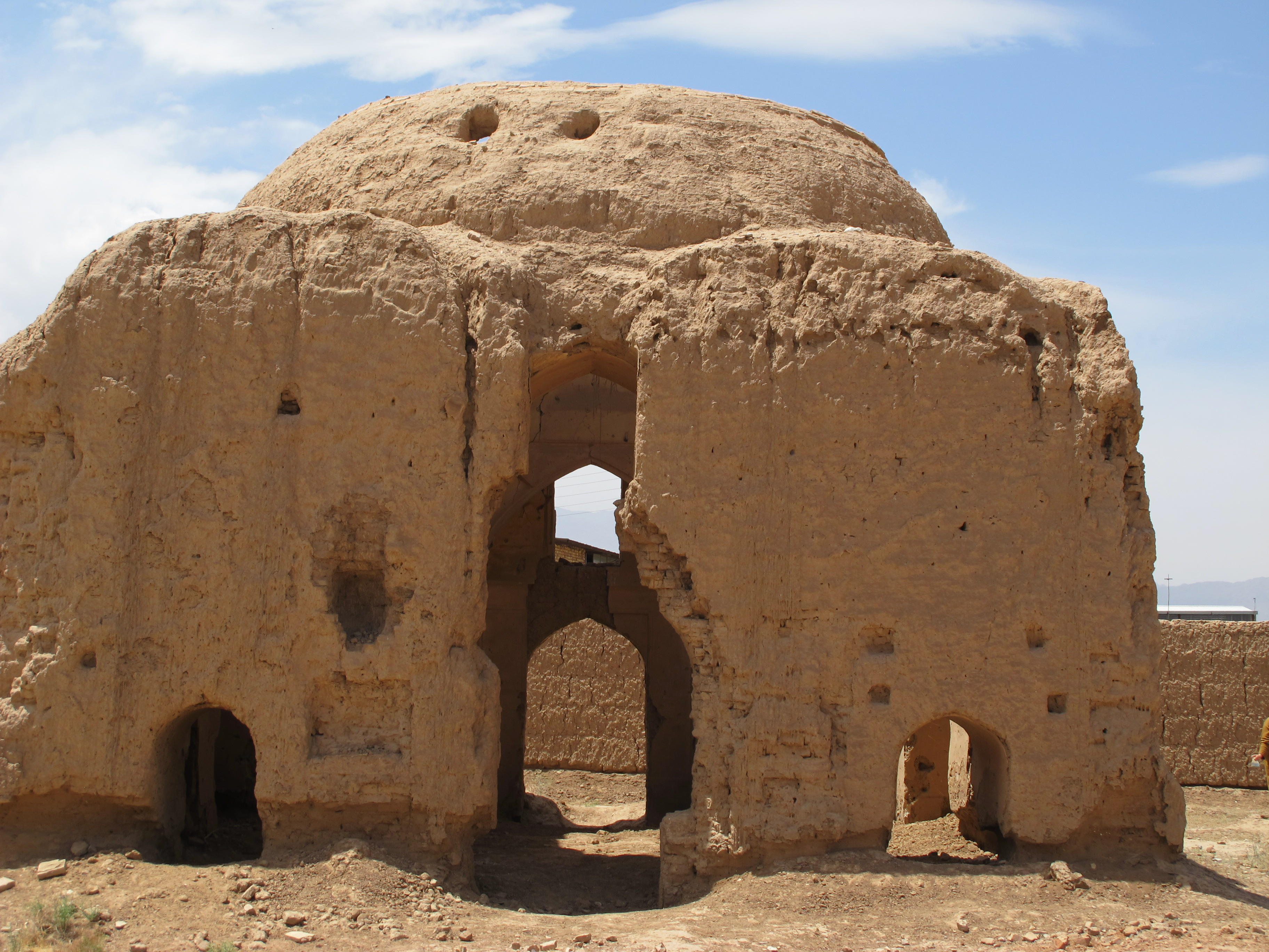 تصویری از عمارت شاسوسا توسط عباس رسول زاده بیدگلی گرفته شده است